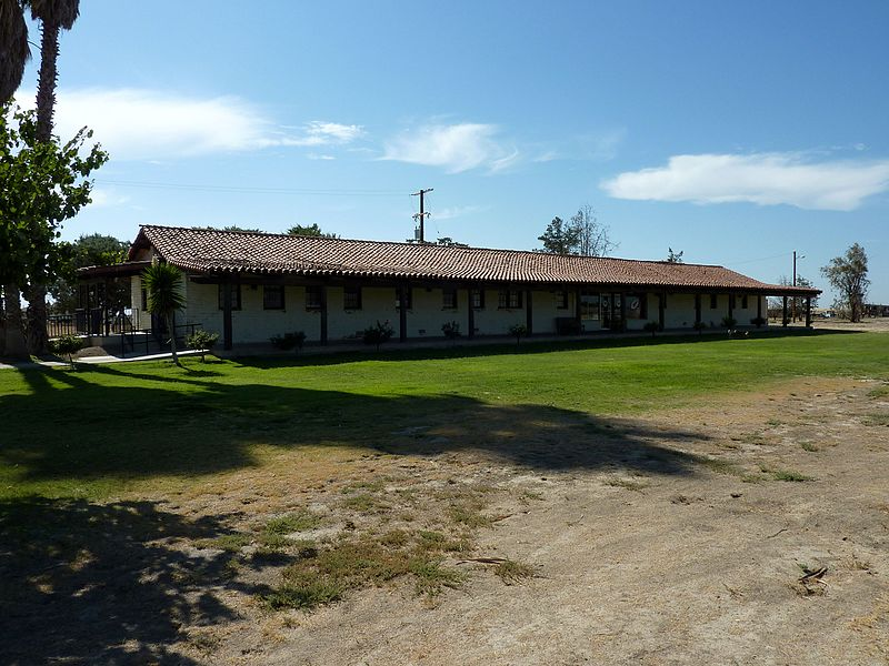 Un lugar donde se hacían reuniones